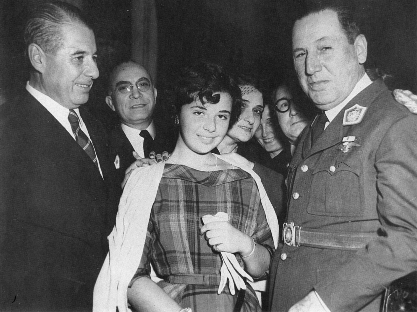 Nelly Rivas y Peron